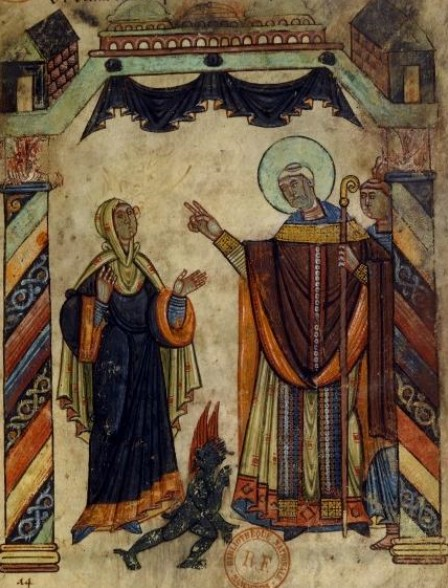 Saint Aubin exorcisant une femme